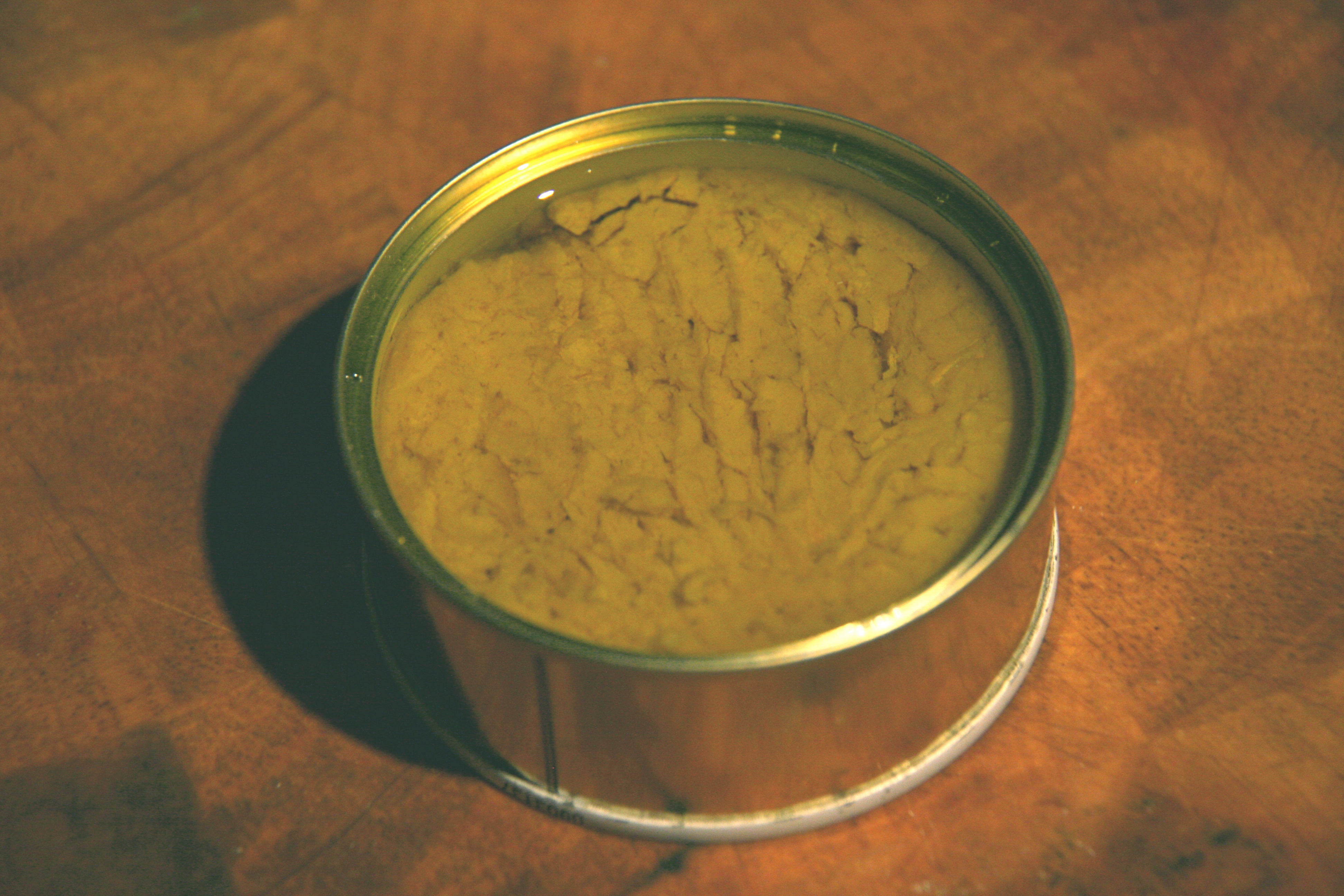 Lata de atún